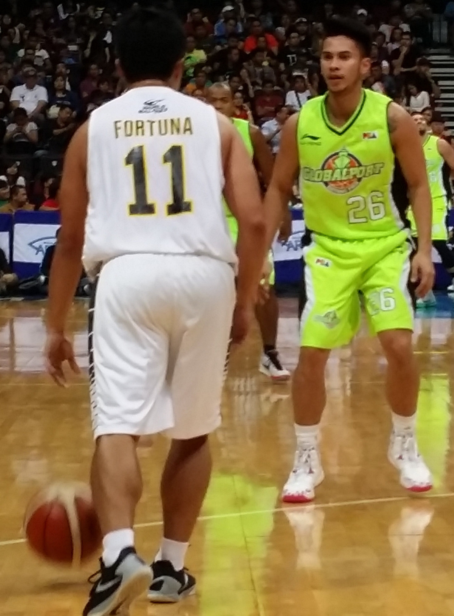 PBA - Globalport vs Barako Bull - Roi Sumang-GlobalPort - 2015-1225